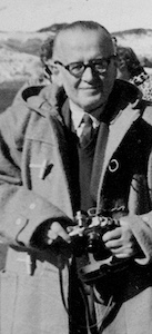 Stefano Bricarelli con la sua inseparabile Leica (1955 circa)